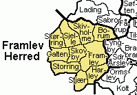 Framlev Herred, Århus Amt, Denmark.